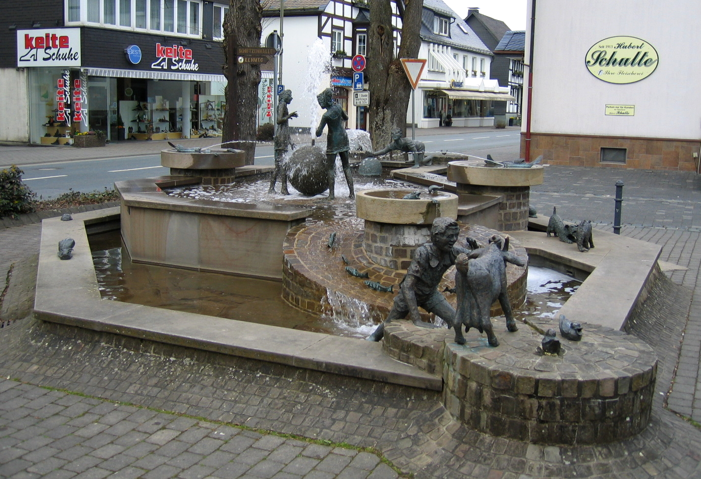 Brunnen im Zentrum von Eslohe.